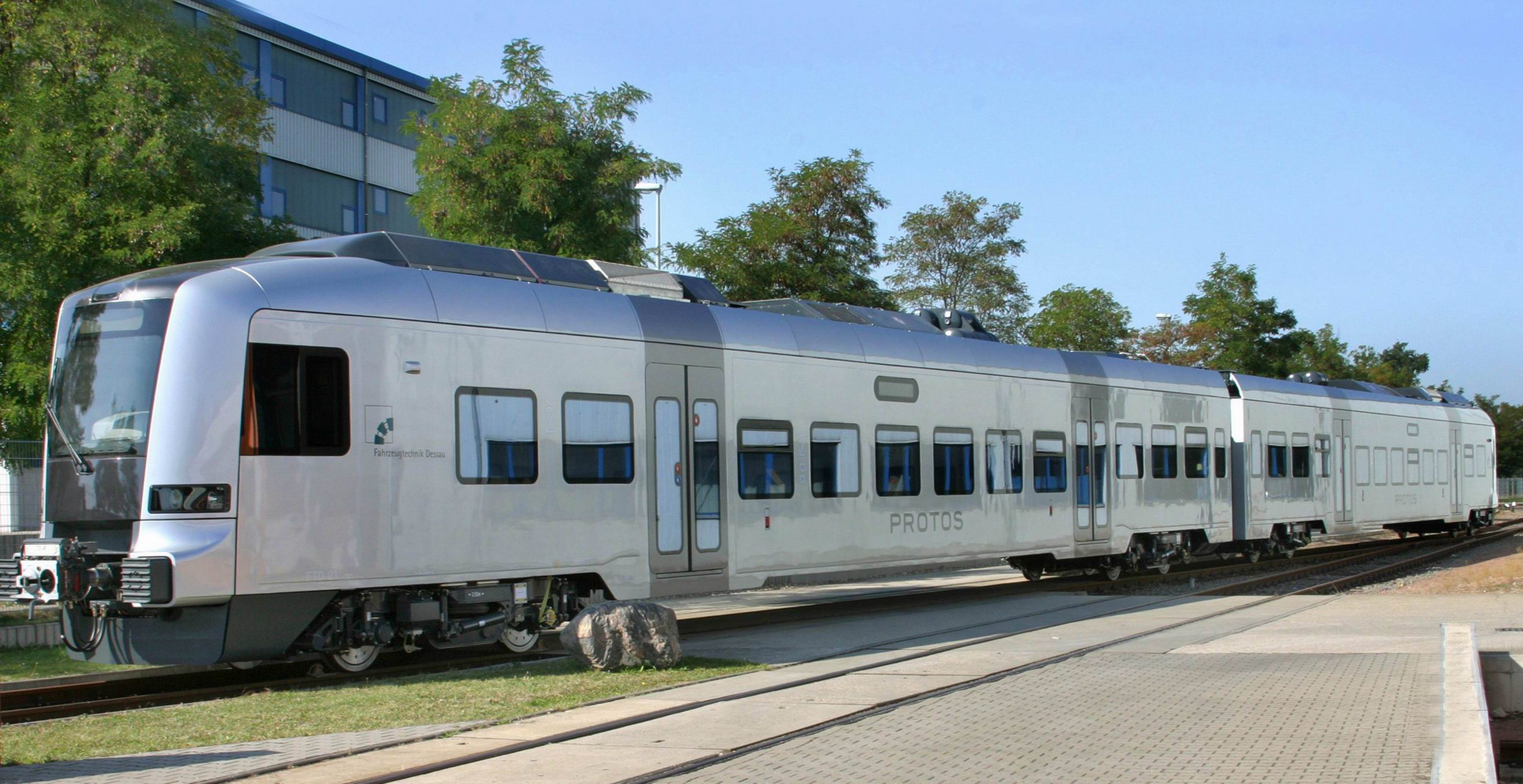 Der Prototyp des PROTOS